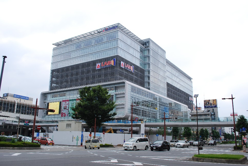 ヤマダ電機LABI高崎。2008年、前橋より移転した本社も兼ねる。歩道上より撮影。